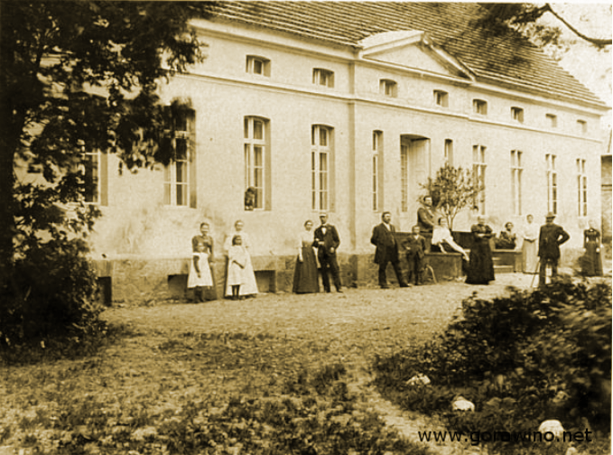 Ehem. Gutshaus Kienow